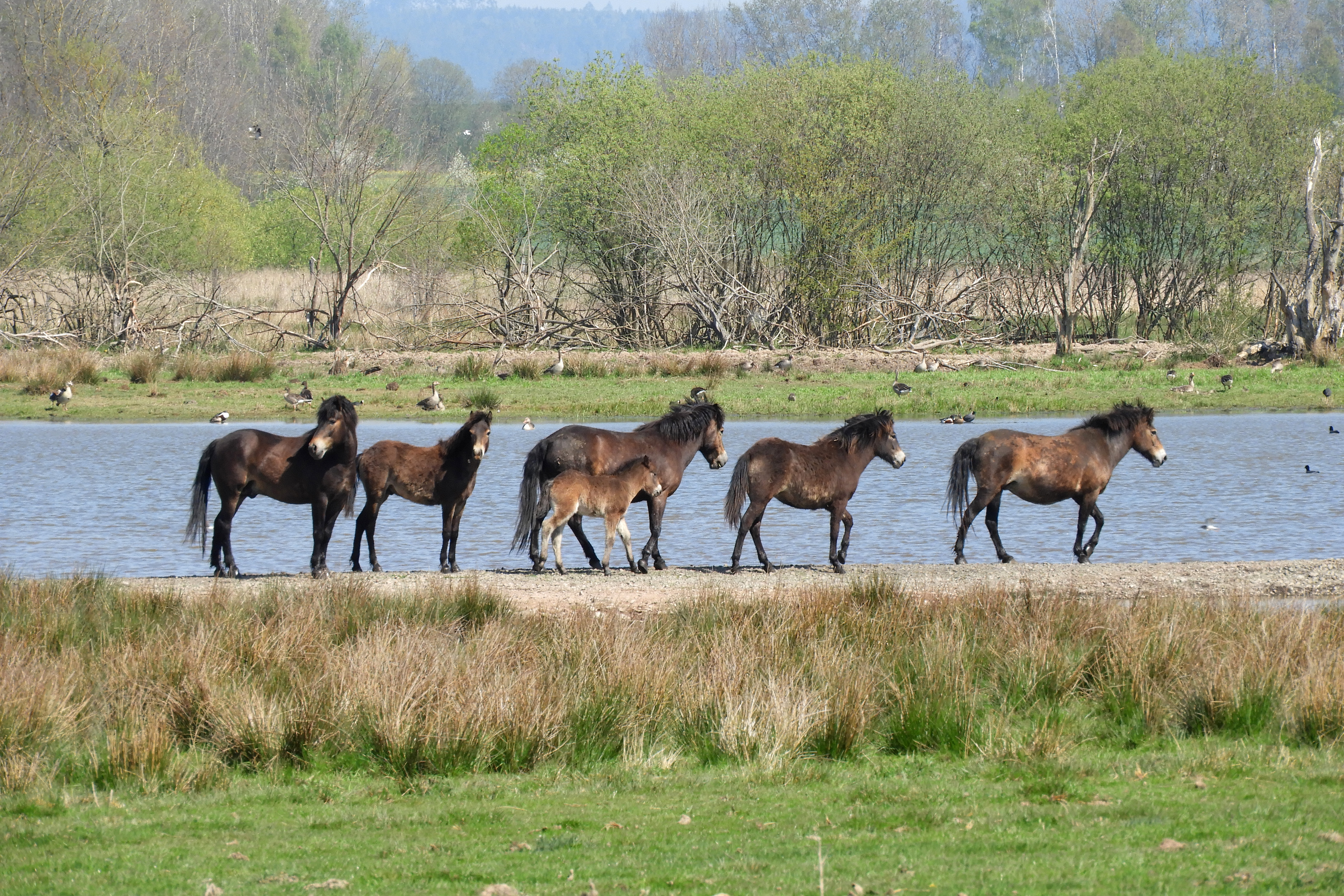 Der „Dankmarshäuser Rhäden“ liegt in der Gemarkung von Dankmarshausen, einem Ortsteil der Stadt Werra-Suhl-Tal im westthüringischen Wartburgkreis. Er ist der südliche Teil eines großen Feuchtgebiets, in einer durch Salzauslaugungsprozesse und tektonische Vorgänge entstandenen Senke im thüringisch-hessischem Grenzland. Einst war das Gelände eine der größten Sumpflandschaften in der breiten Talniederung der Werra. Nach der Trockenlegung, in der Mitte des 19. Jahrhunderts und langjähriger Grünland- und Ackernutzung, wurde das Gelände durch gestaltende Renaturierungwieder zu einer Auenlandschaft, die von naturnahen Biotopen geprägt wird. Die Rhädensenke gehört zu den bedeutendsten Brut- und Rastgebieten für Wasservögel und Wiesenbrüter in Thüringen und Hessen. Seltenen Tier- und Pflanzenarten bietet sein Gelände Lebensräume. Um diesen vielfältigen Bereich zu erhalten und weiter zu entwickeln, wurden die Fläche zum Naturschutzgebiet erklärt und als ein Flora-Fauna-Habitat-Gebiet in dem europaweiten Netz von Schutzgebieten „Natura 2000“ ausgewiesen. Der Rhäden wird als wichtiger Bestandteil des Verbundsystems „Feuchtbiotope der Werraaue“ und des „Grünen Bandes“ entlang der ehemaligen innerdeutschen Grenze angesehen.